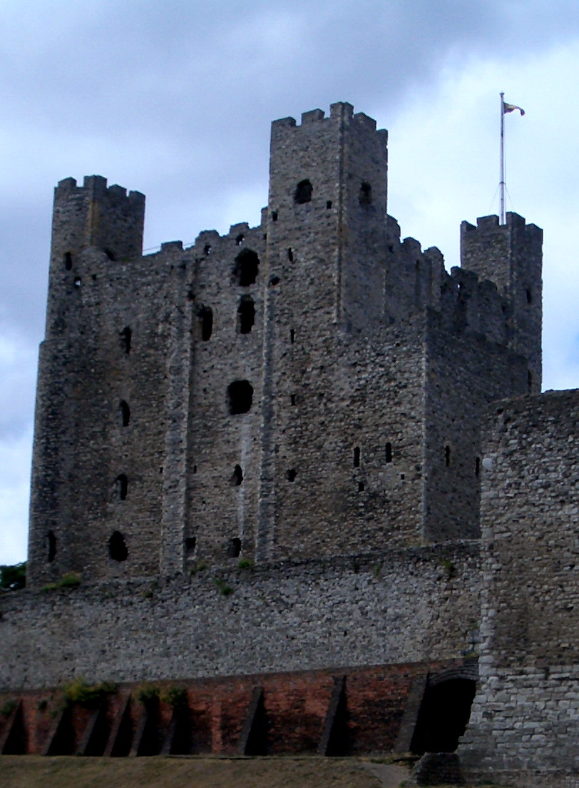 Normannischer Keep von Rochester (Kent)